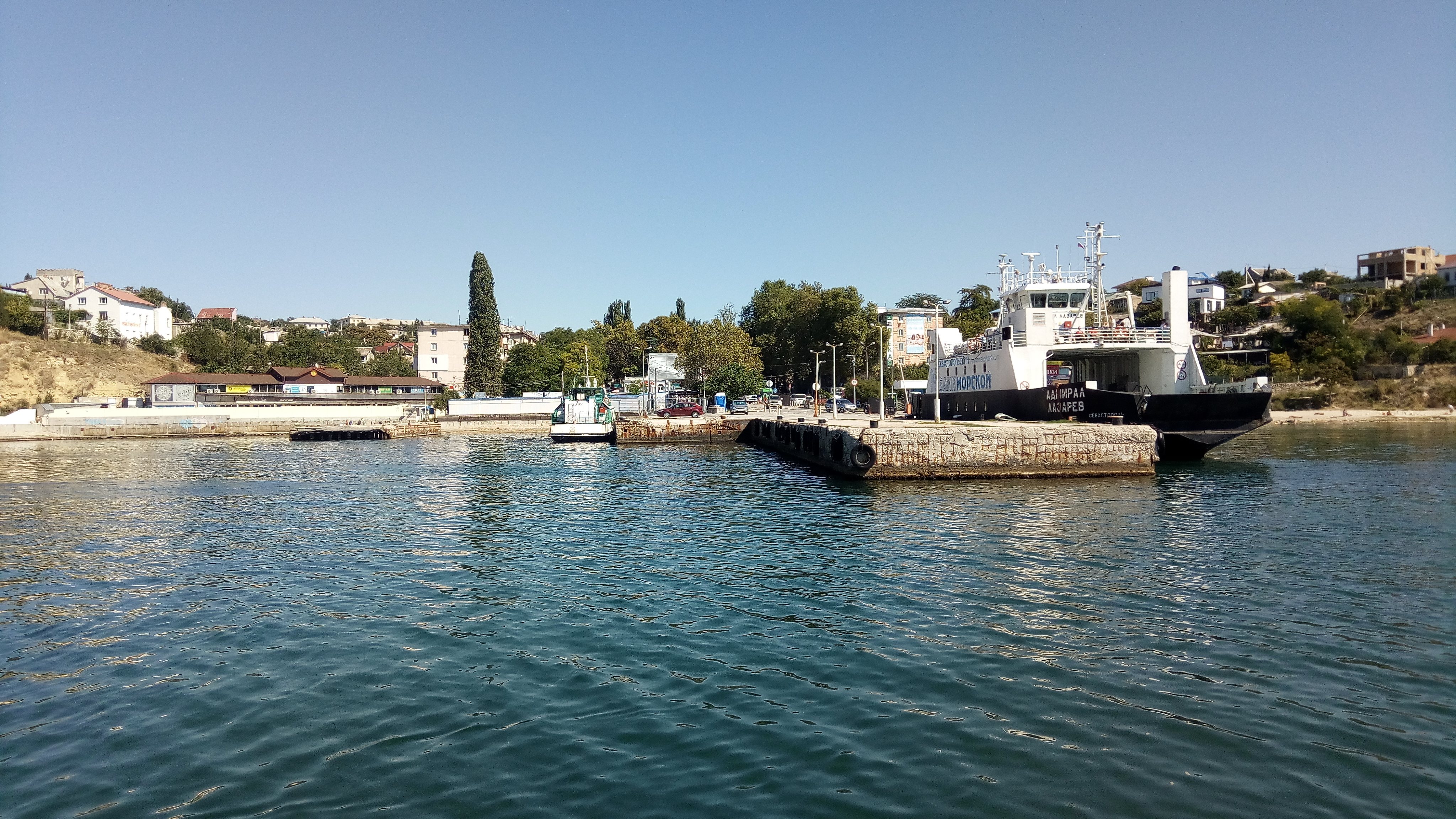 Северный причал (Севастополь)